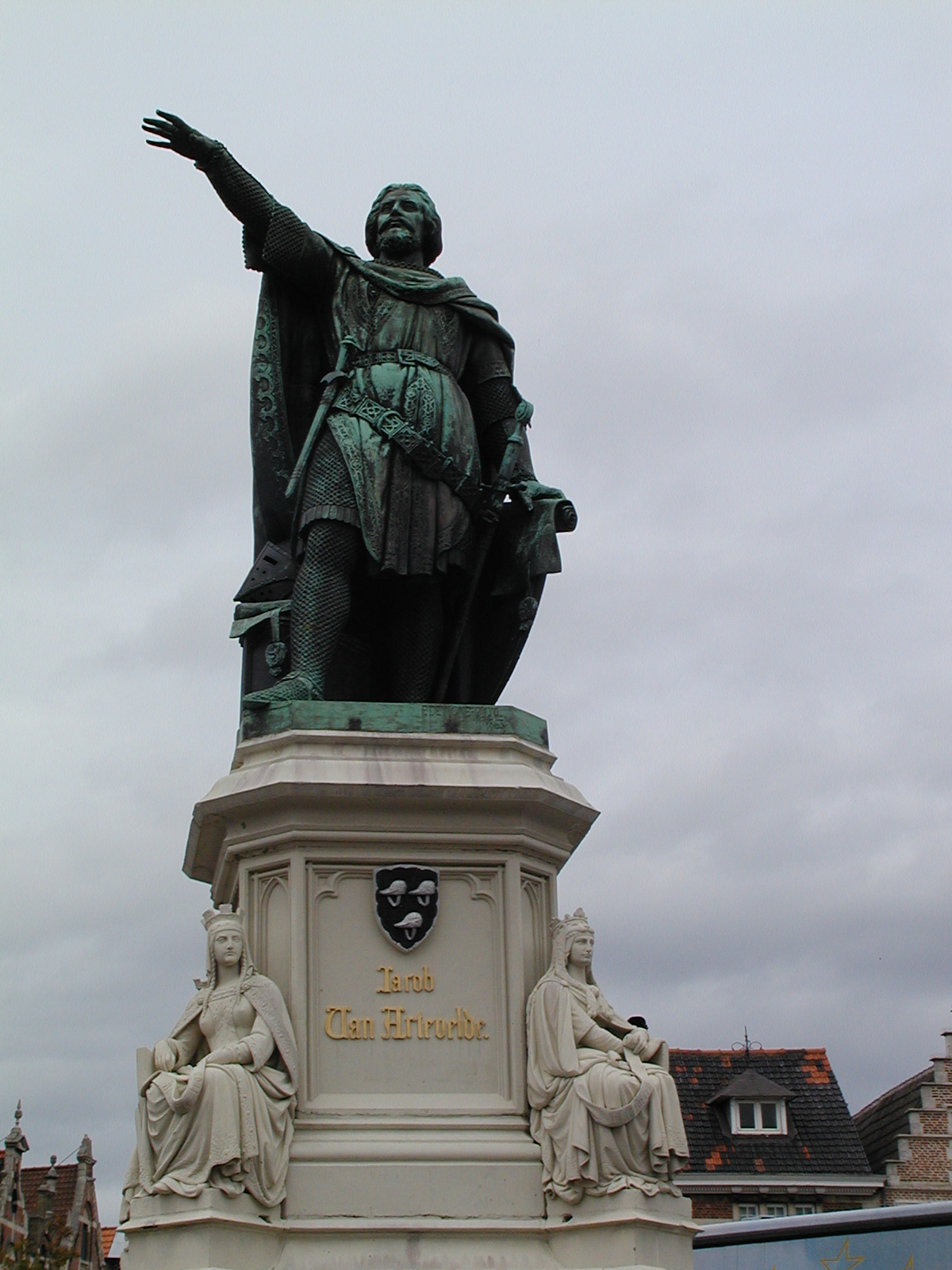 fotis ĝin yvesn septembro 2005